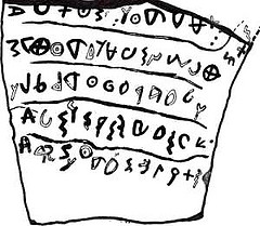 صحيفة كنعانية مكتوب عليها بلغتهم الخاصة